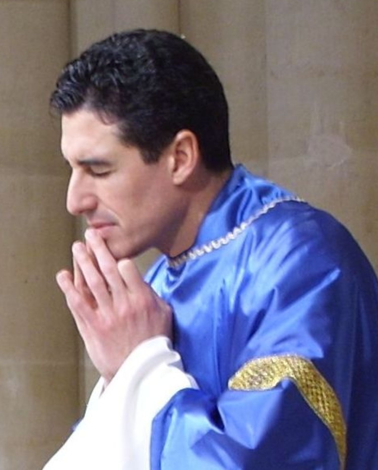 MMZS se recueille pendant la messe (pendant l'offertoire ou bien après la communion)